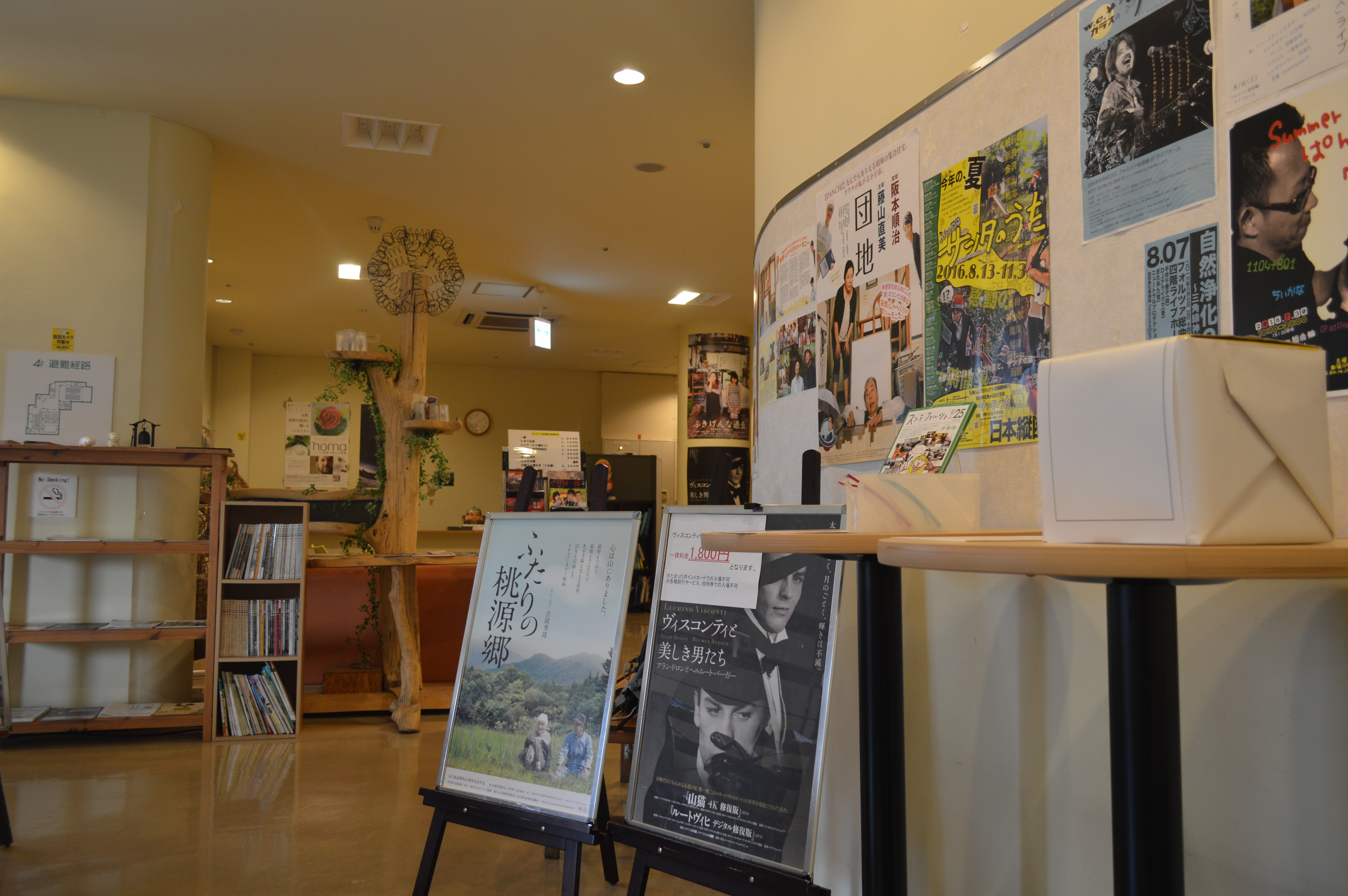 富山市の映画館「フォルツァ総曲輪」（2016年9月末で閉館）。2016年7月末に撮影。